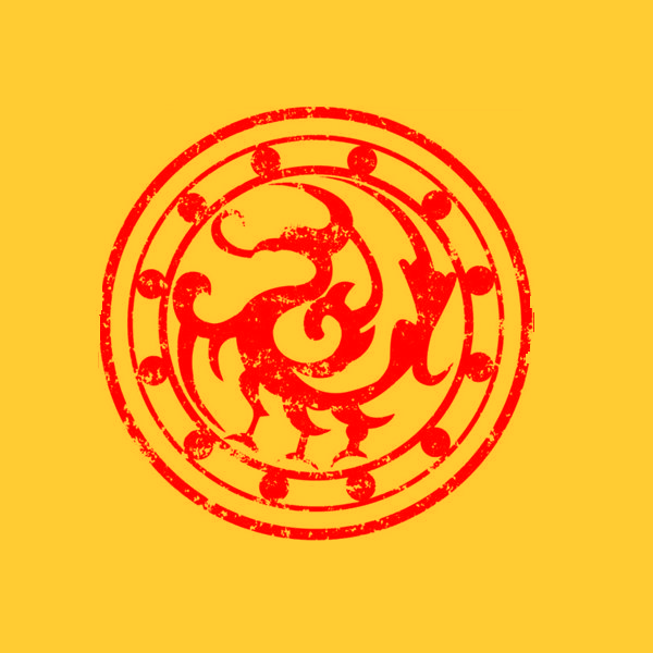 پرچم جومونگ